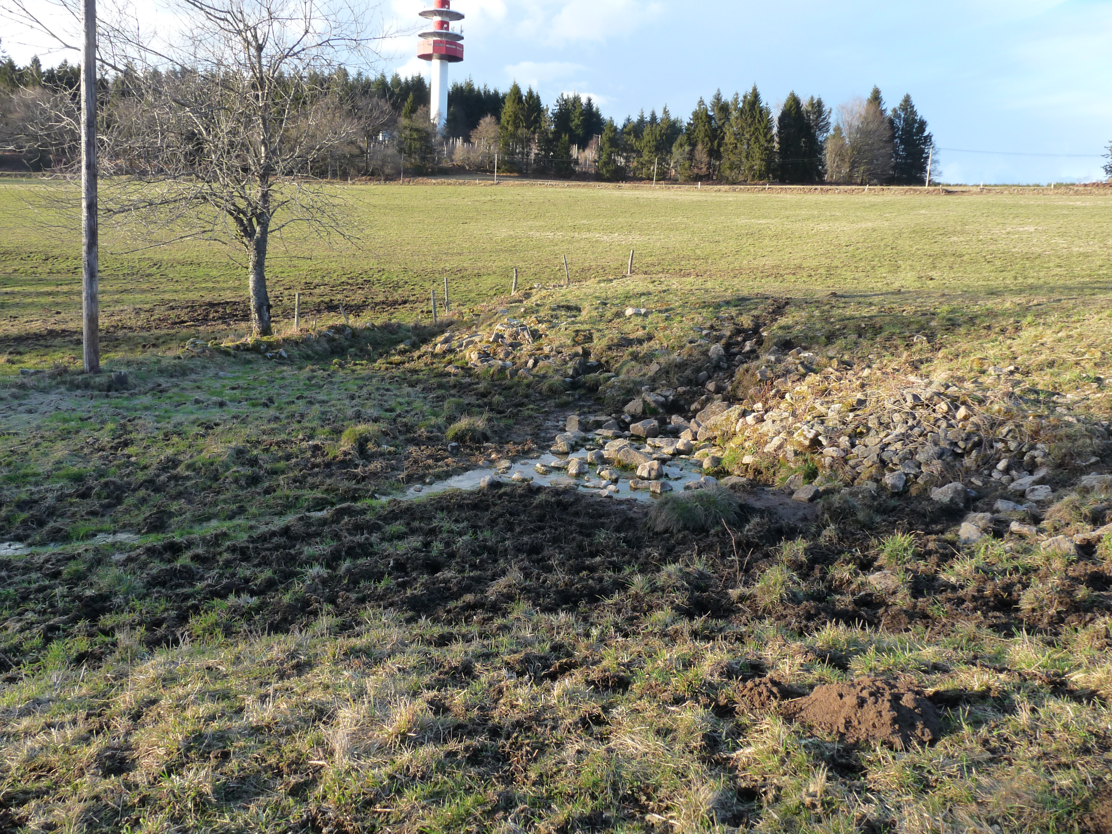 Source de la rivière le Rivalier, affluent de la Gartempe à Saint-Goussaud dans le département de la Creuse